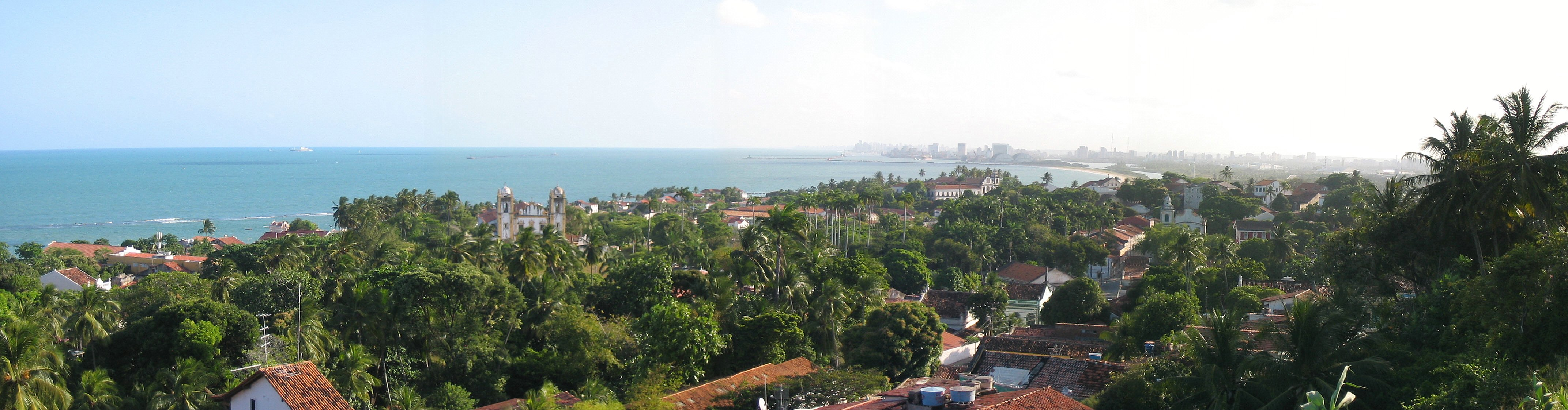 Panoramica_Olinda_e_Recife_ao_fundo